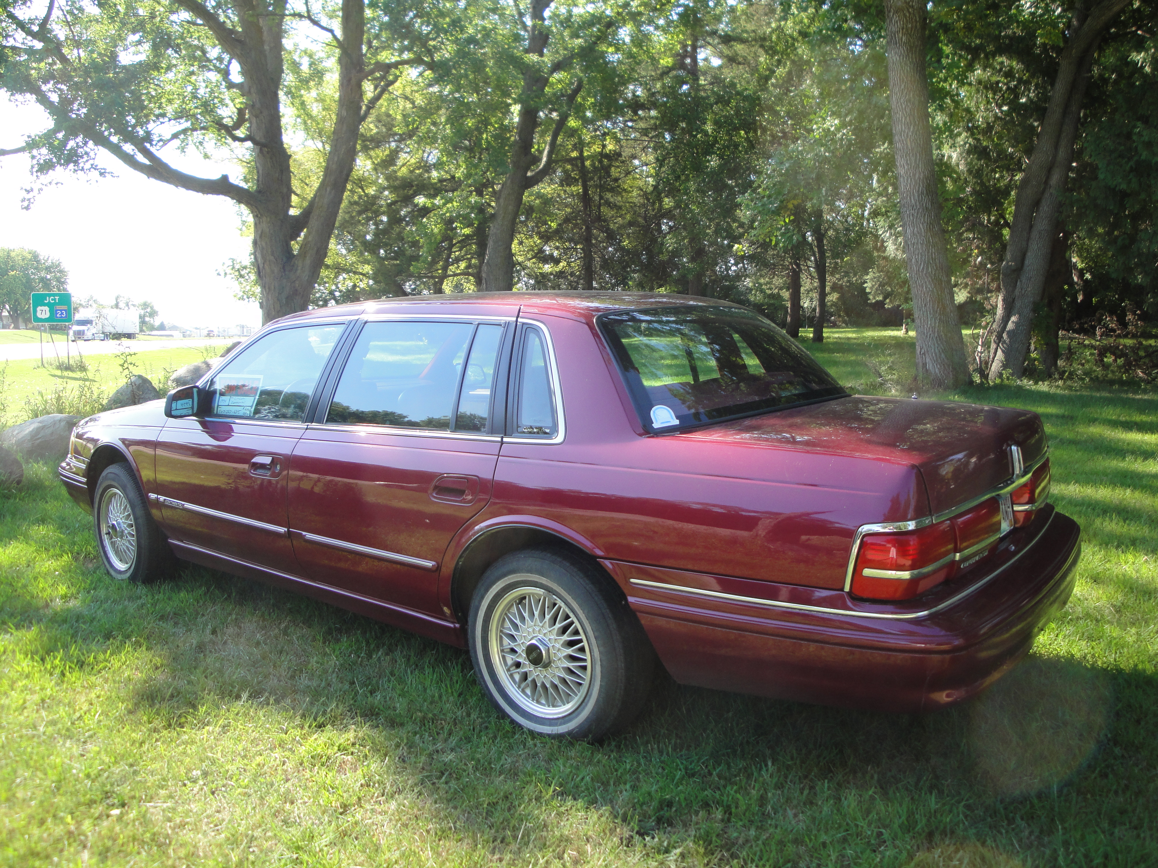 94 Lincoln Continental